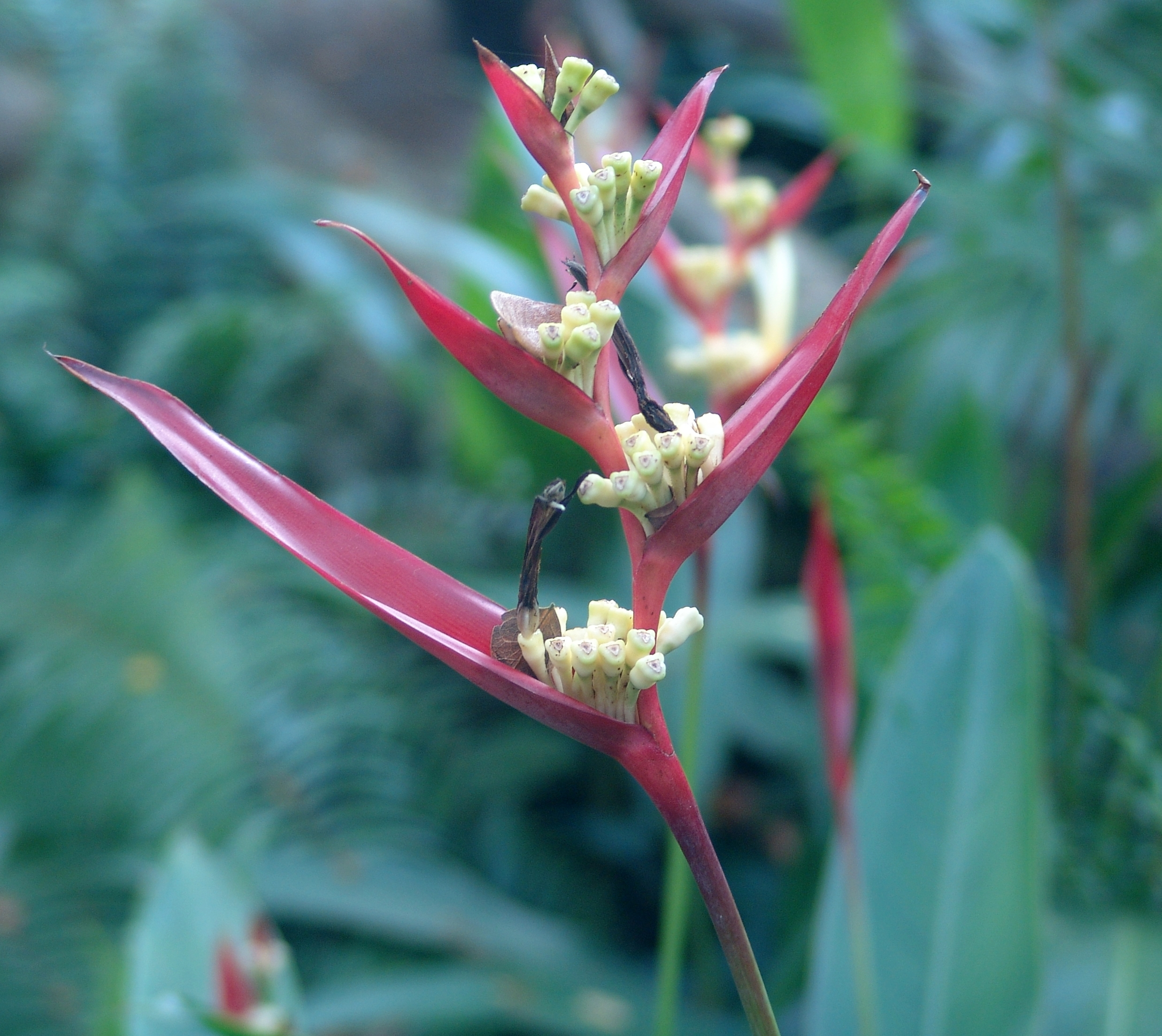 Jurong Bird Park